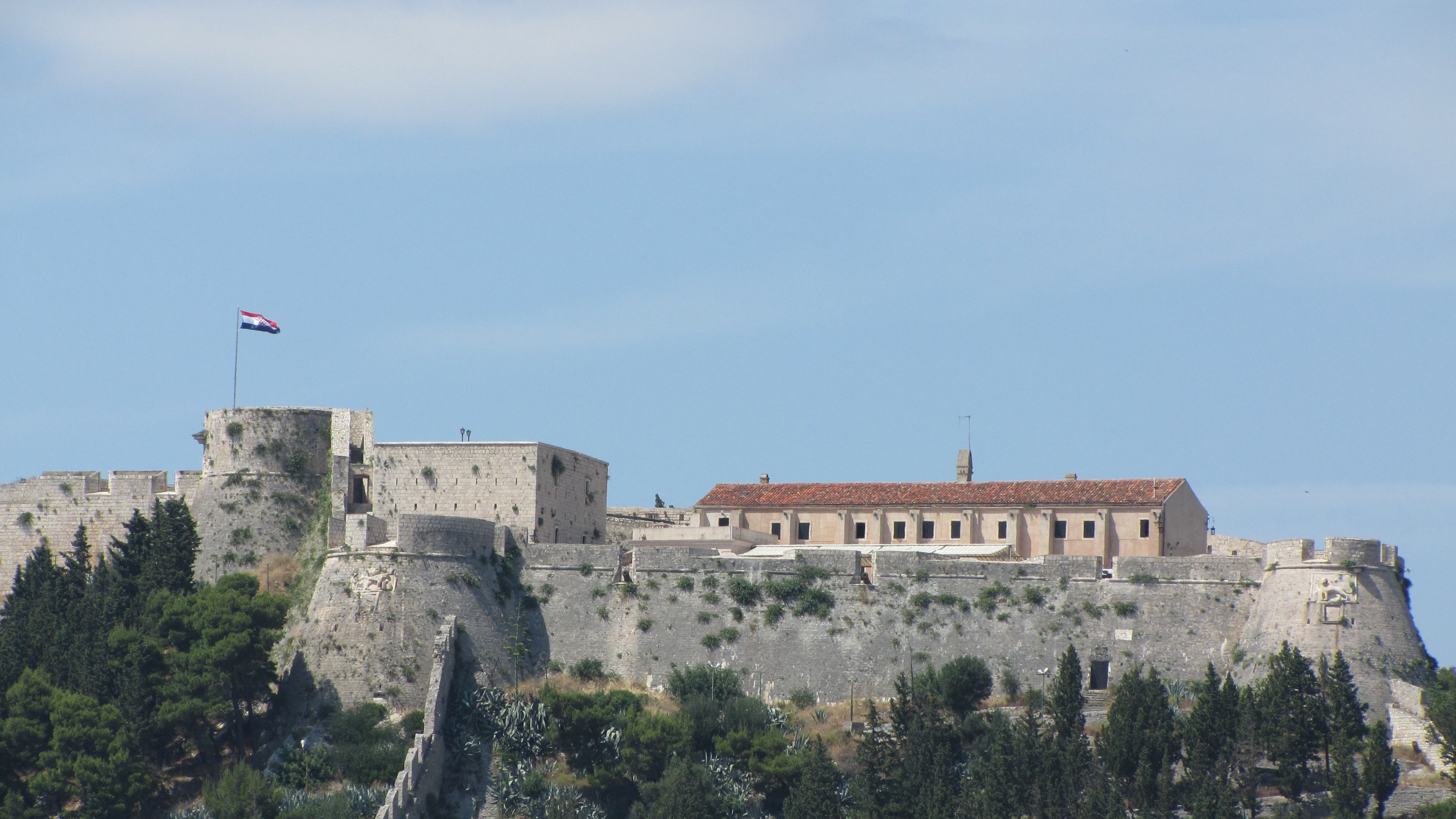 Hvar fortress